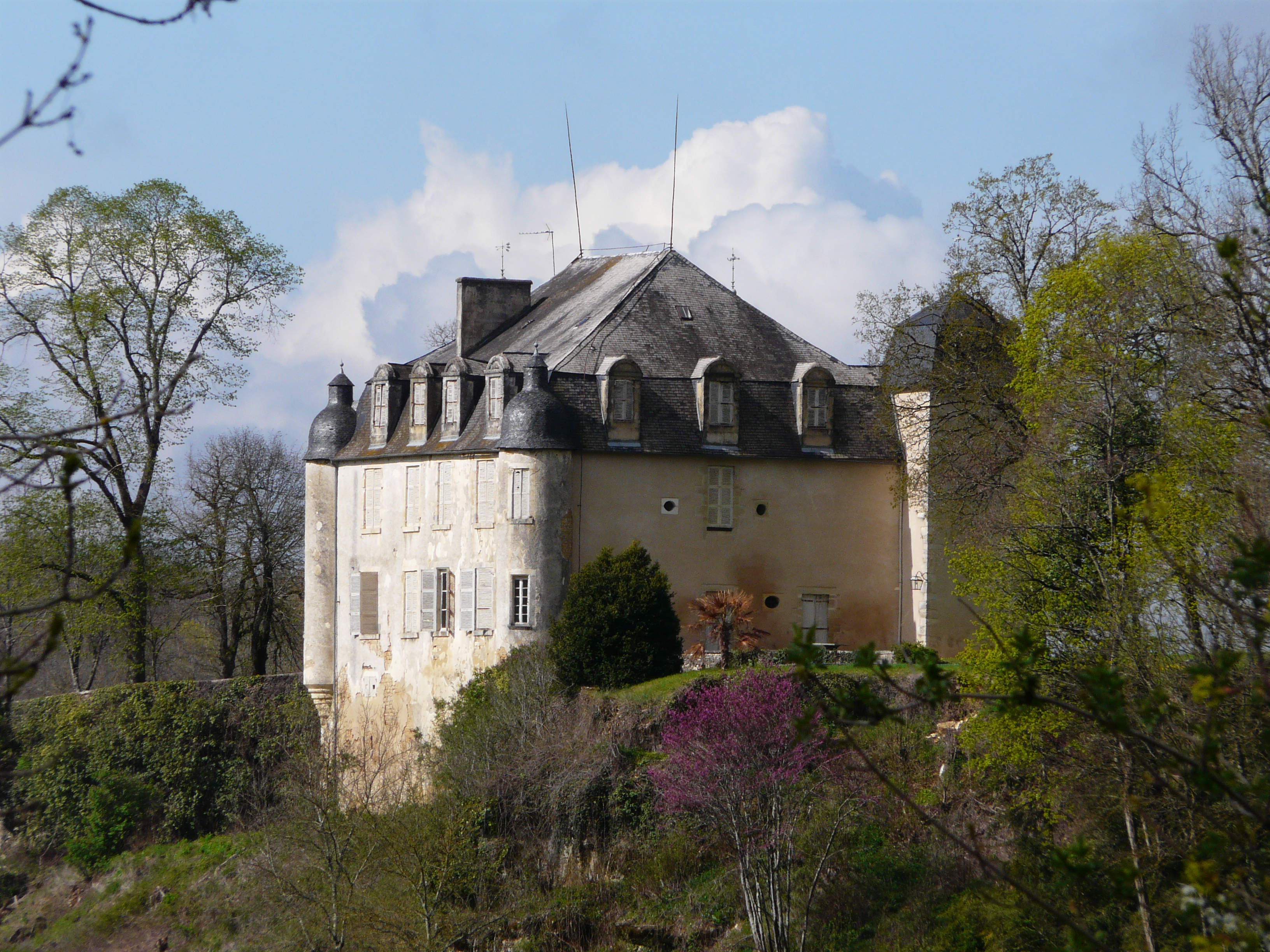 Le château de la Roche, Saint-Pantaly-d'Excideuil, Dordogne, France. Vue prise depuis le nord-est